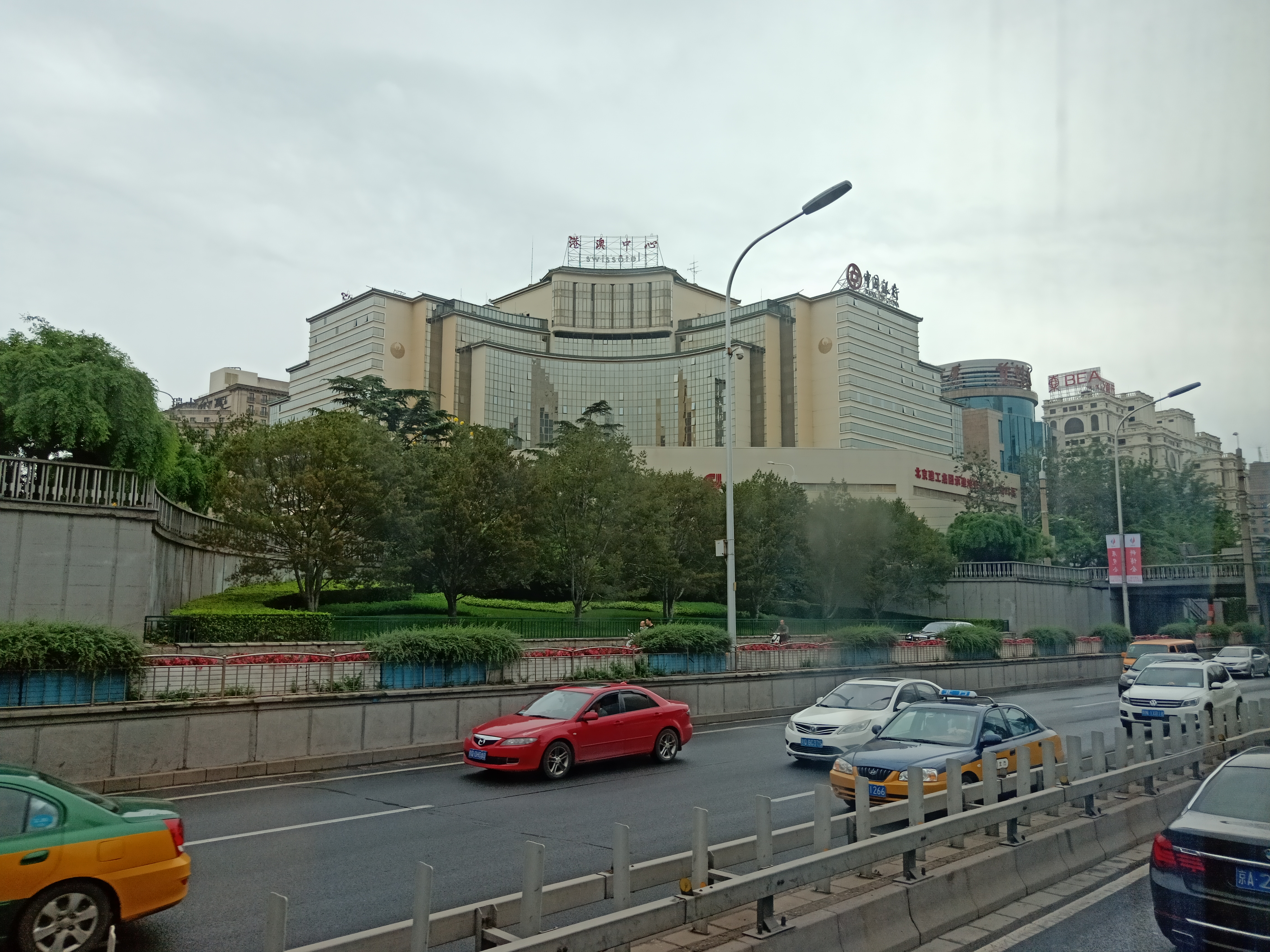 粵語: 北京港澳中心瑞士酒店